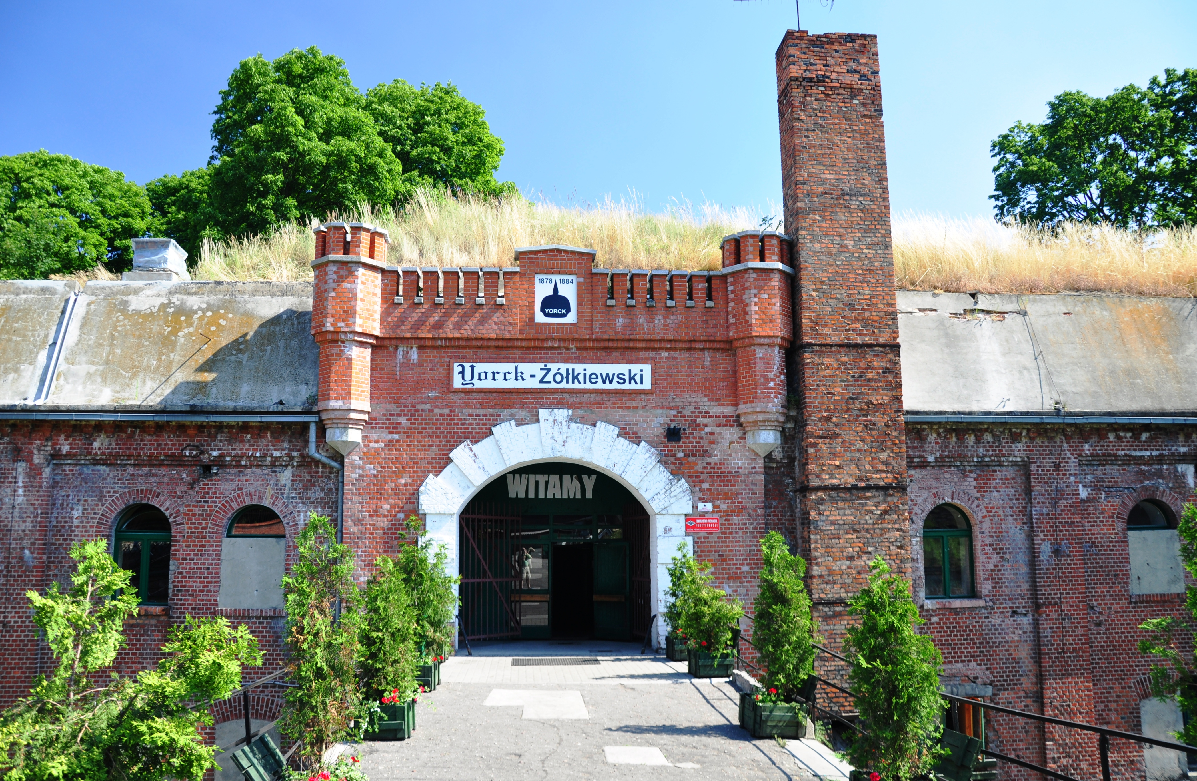 Fort IV Torun, Haupteingang